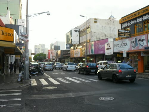 Av. Floriano Peixoto, Centro de Uberlândia